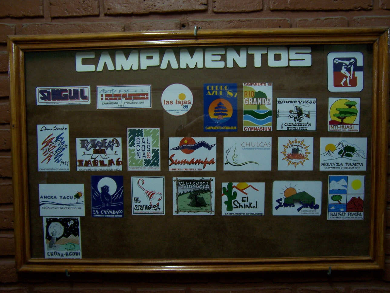 Calcomanias de los campamentos